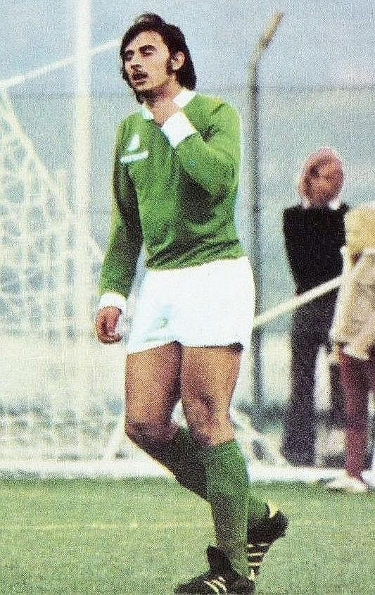 Alain Merchadier en 1972, 'Ageducatifs Football 1972 - 1973', Panini figurina n°218.